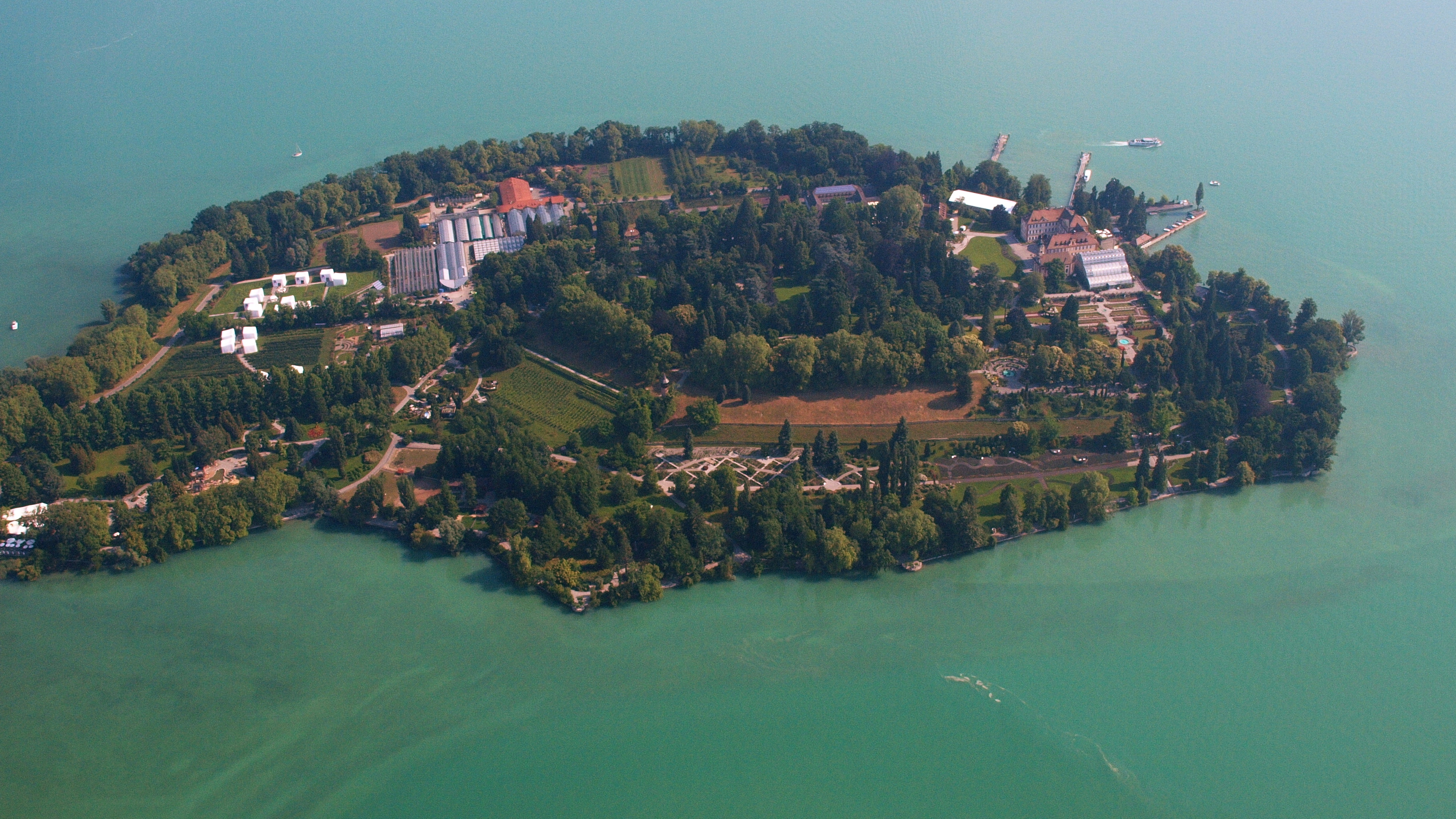 Mainau, Luftbild 2010